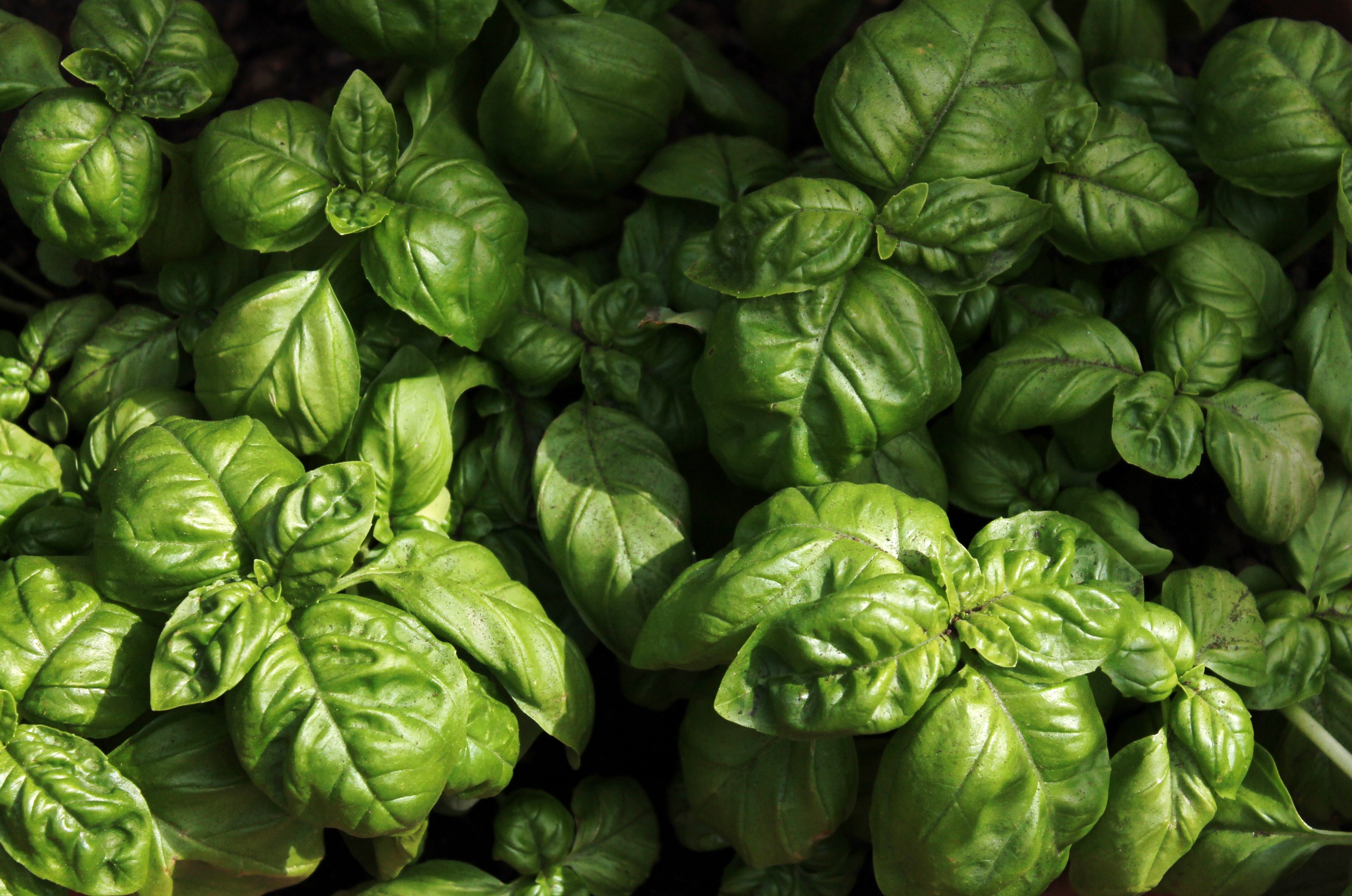 Basilico genovese